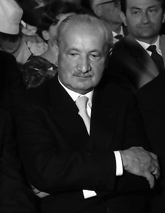 Photograph of Martin Heidegger. Detail of a phototgraph entitled : "W 134 Nr. 060678a - Hausen: Festakt, in der Reihe, Kultusminister Storz, Prof. Heidegger, Dichtel ". Additional reference : Teilbestand W 134 (Neg. BaWü), Teil 1 - Fotosammlung Willy Pragher: Filmnegative Baden-Württemberg, Teil 1.